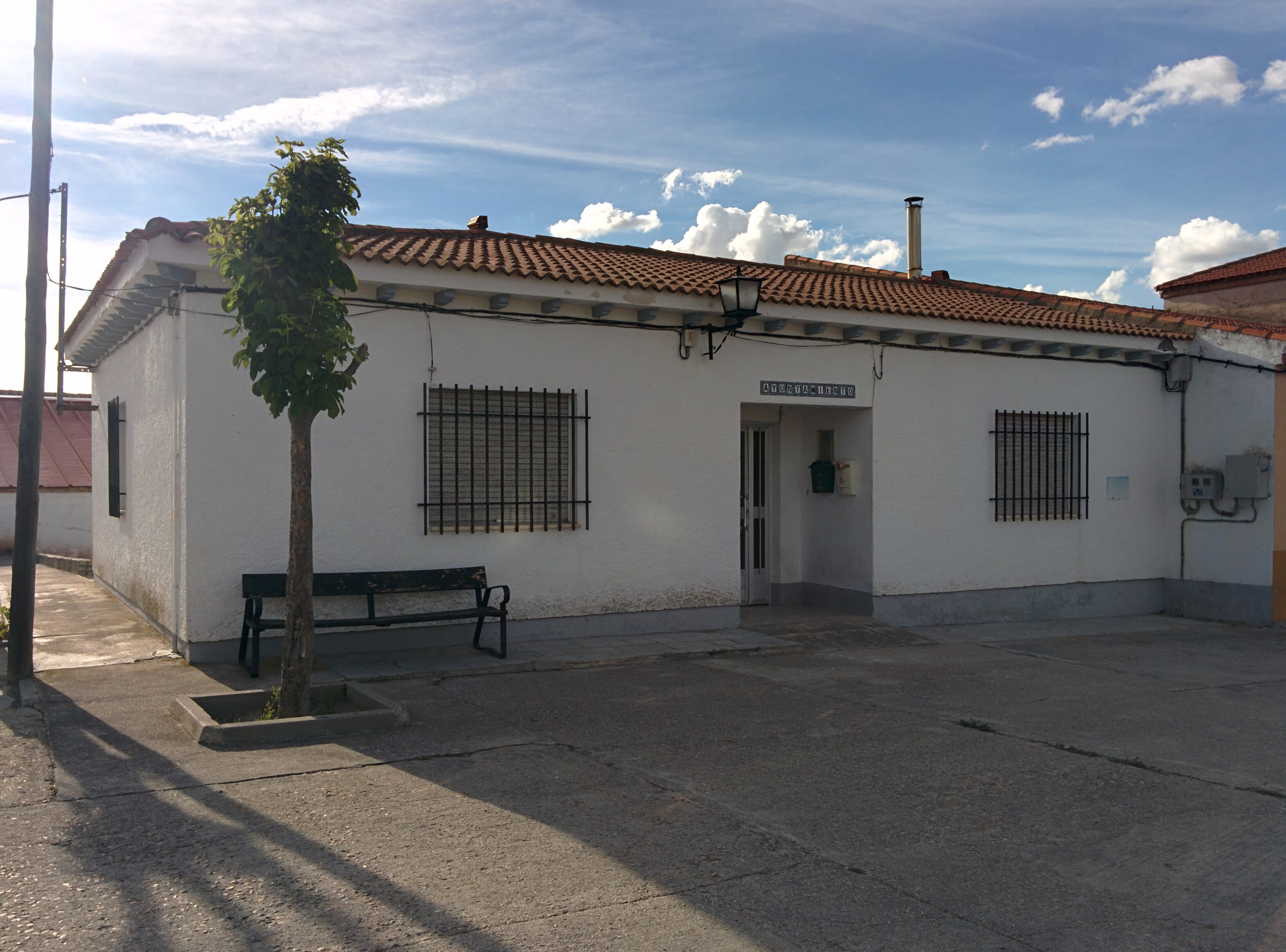 Casa consistorial de Sinlabajos (Ávila, España).